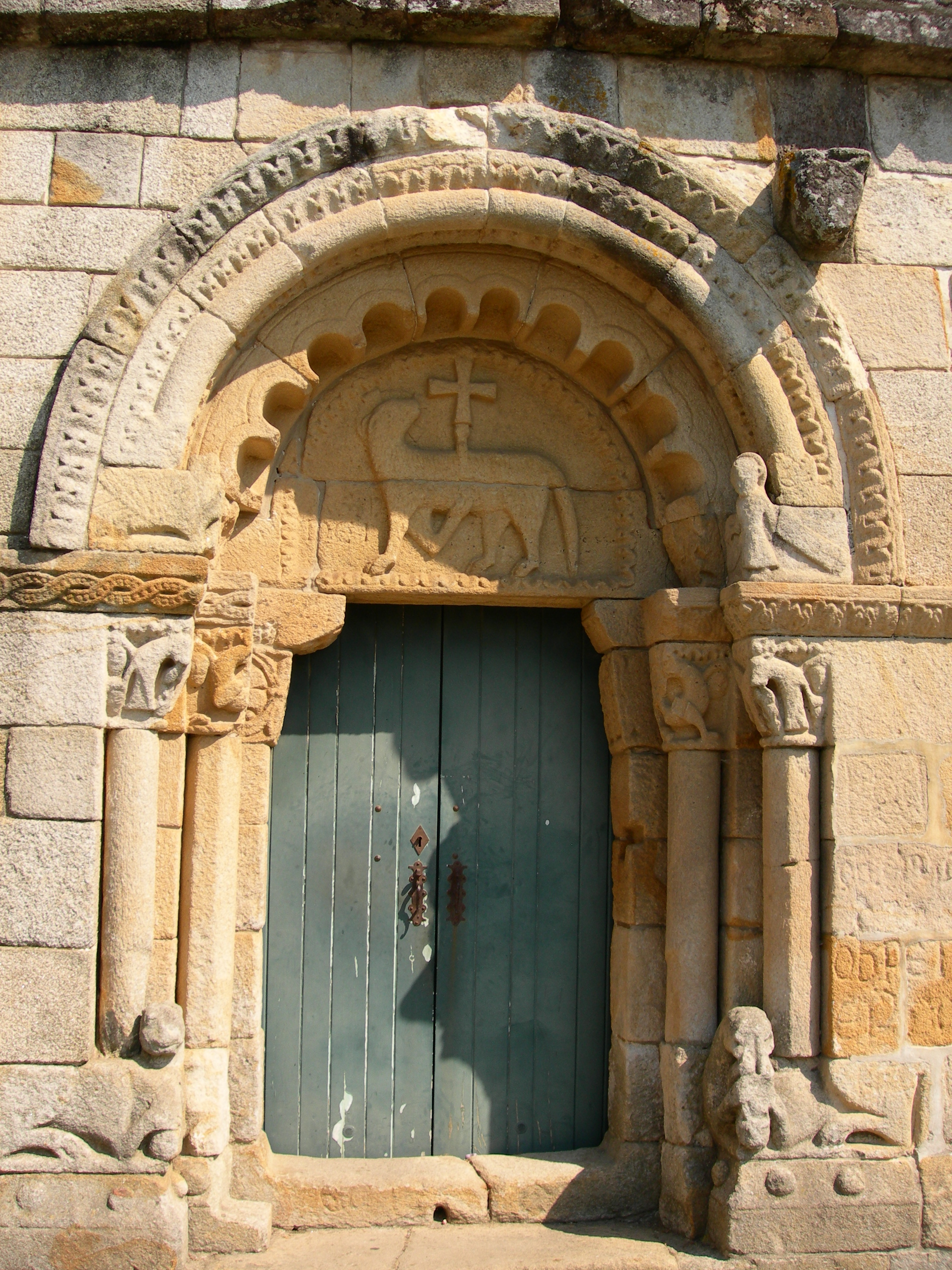 Igreja de São Pedro de Rates VII This file was uploaded for Wiki Loves Monuments in Portugal with the unique identifier 70220.